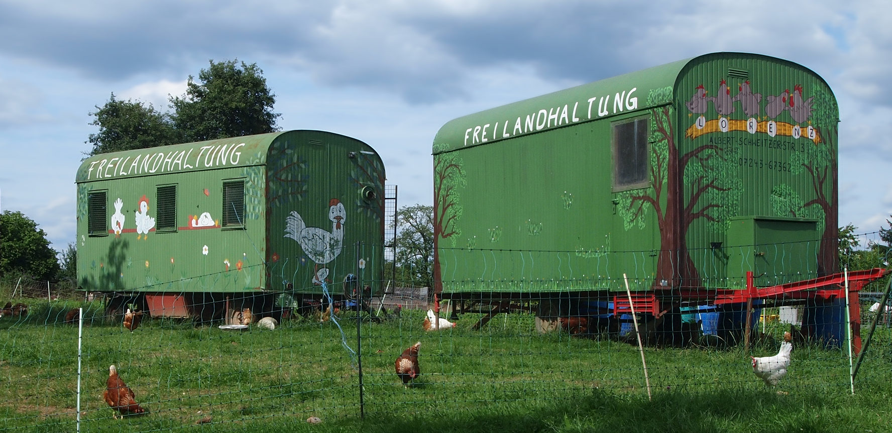 Freilandhaltung von Hühnern in Busenbach